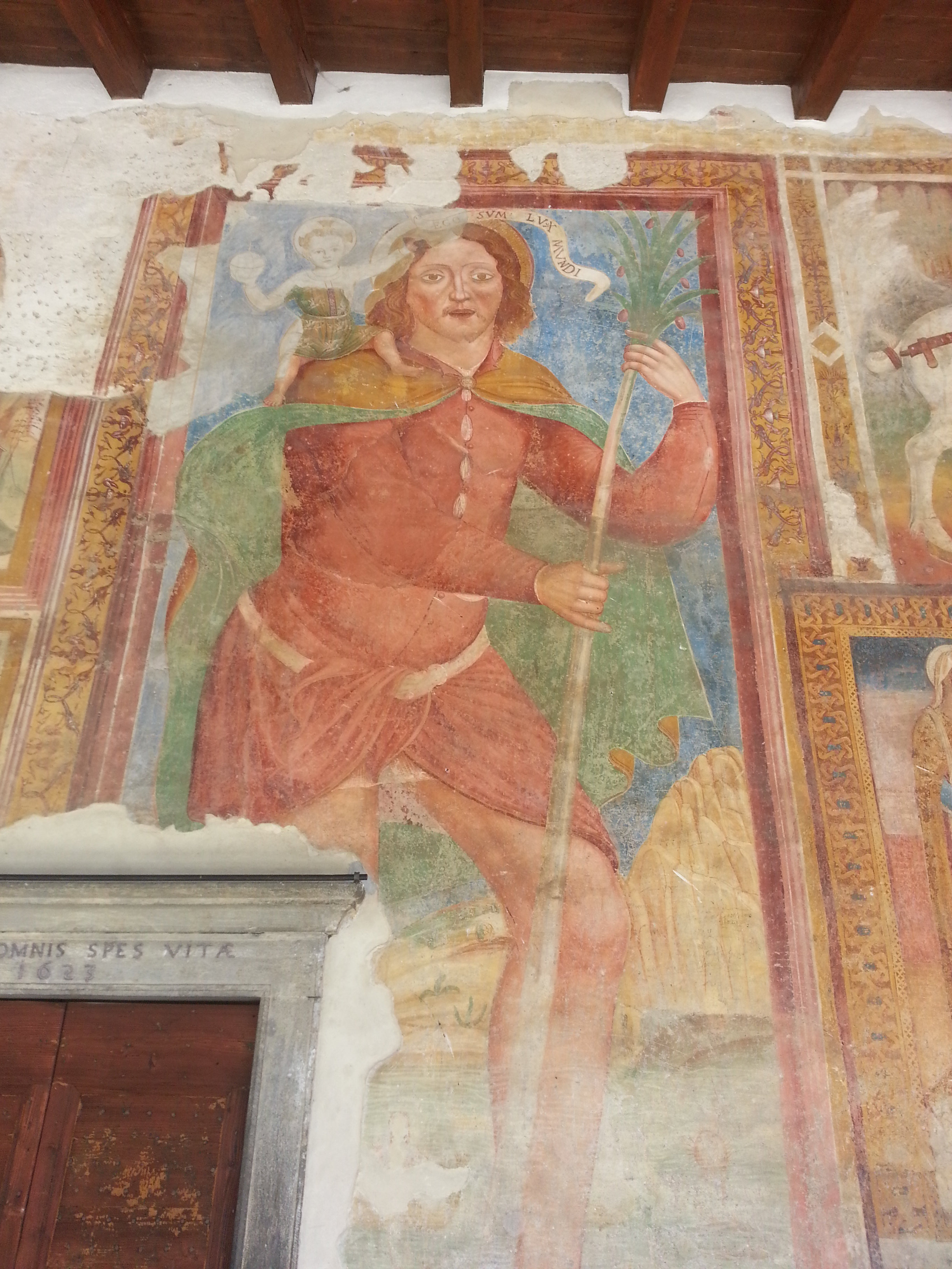 Chiesa di Santa Maria Assunta